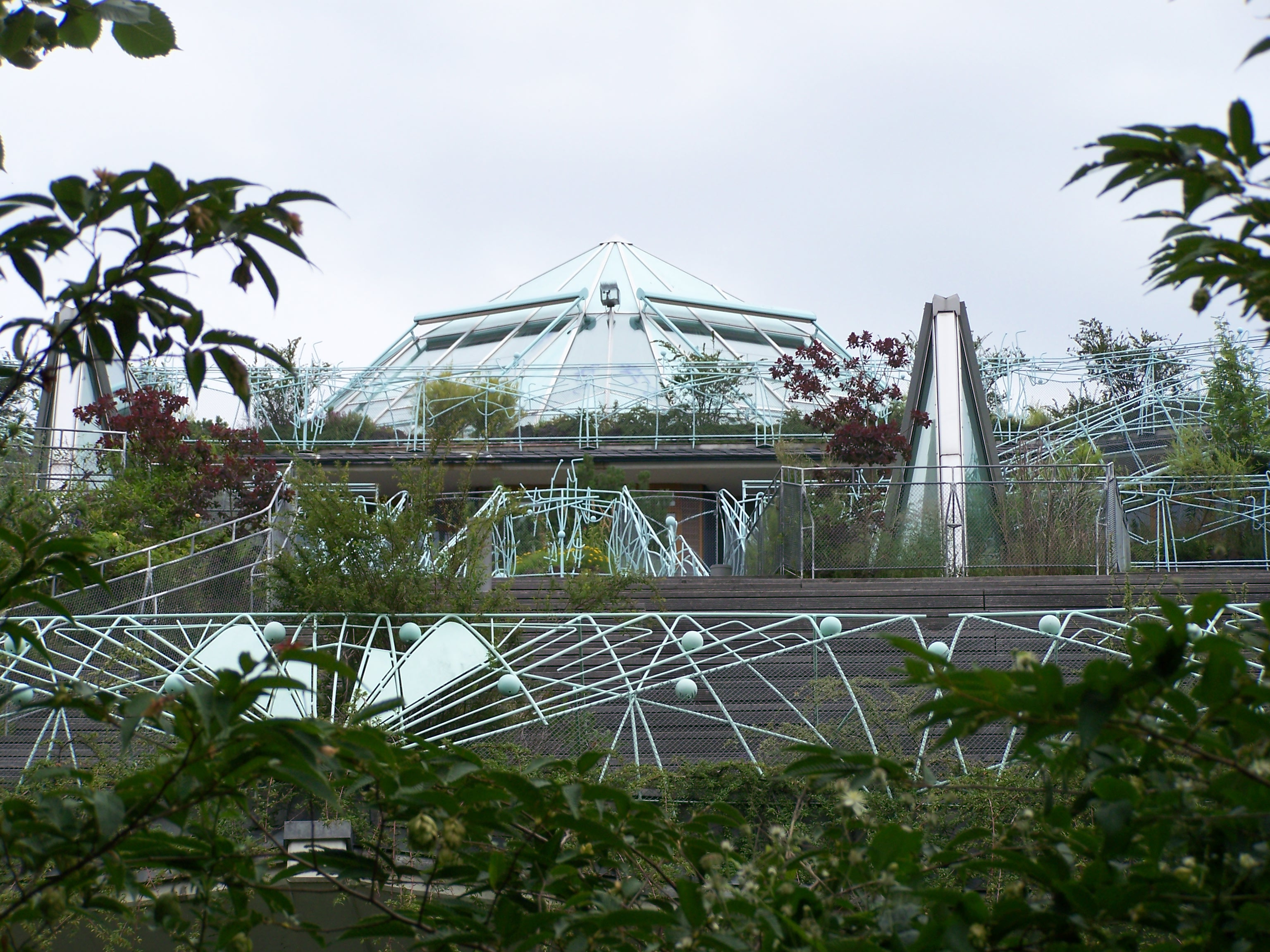 Spreewald-Grundschule in Berlin Schöneberg, Gebäude von Hinrich Baller entworfen